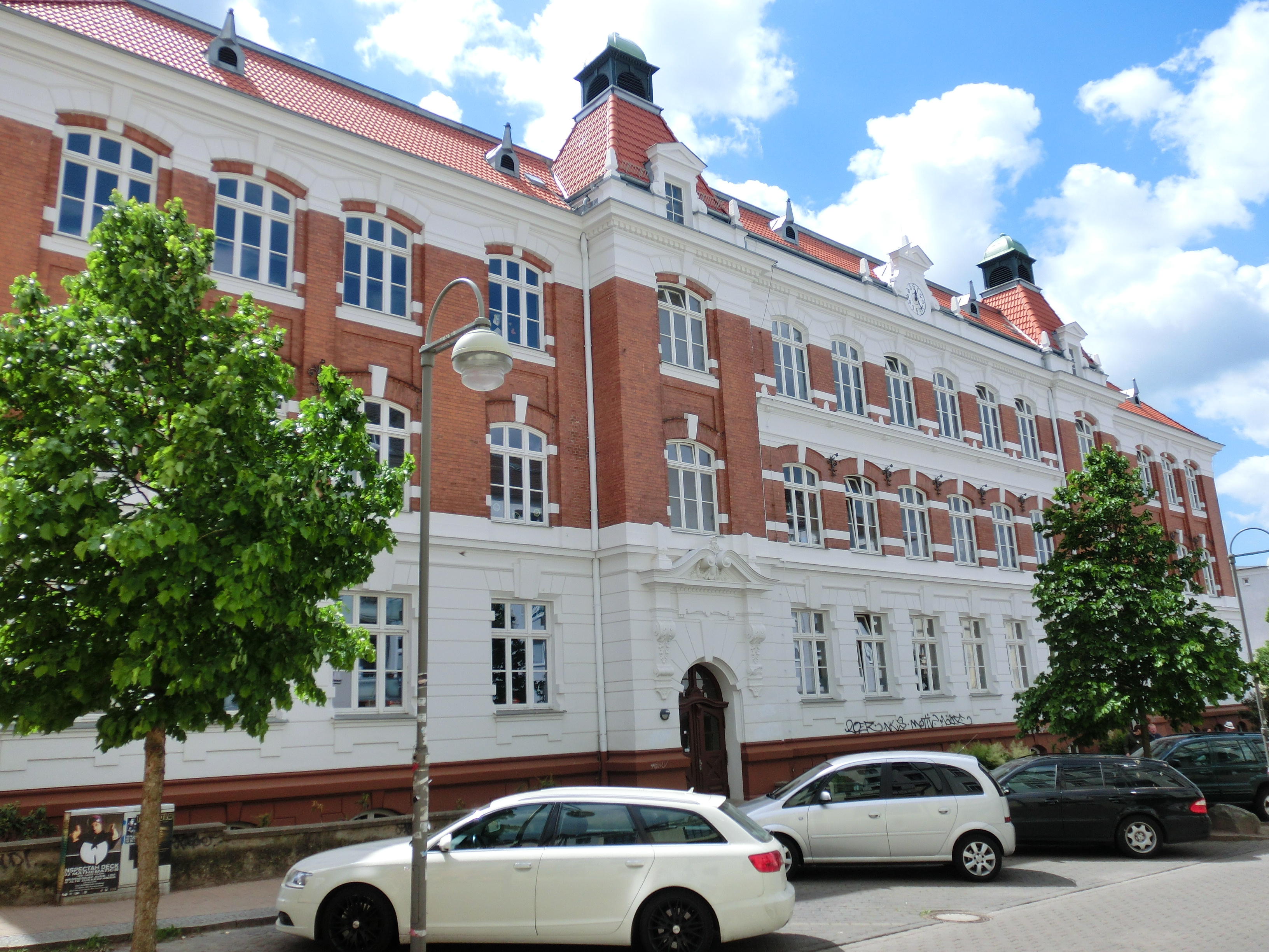 Rostock Barnstorfer Weg 21a Margaretenschule Baudenkmal